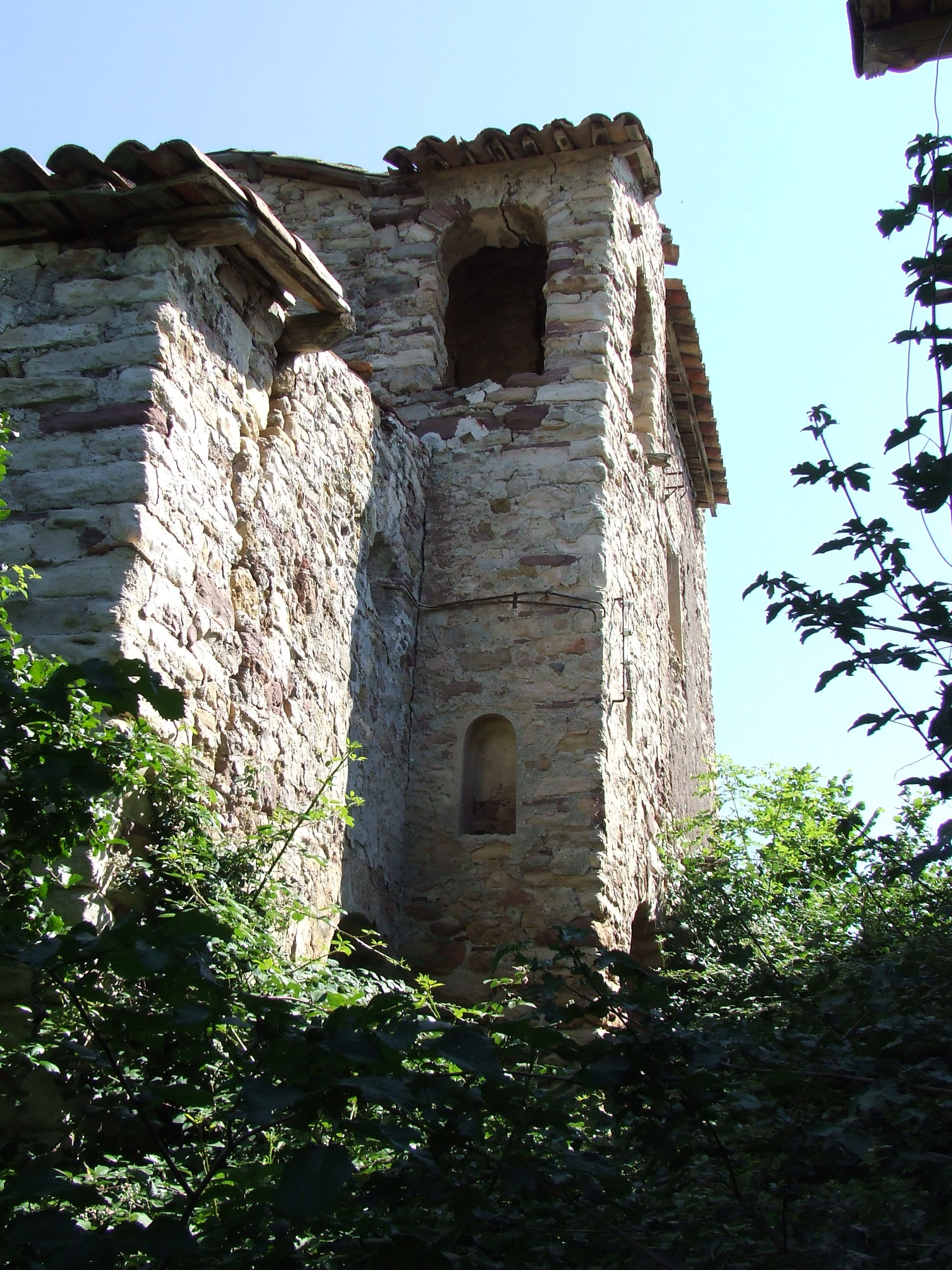 Les ruïnes de Santa Coloma d'Erdo (Sarroca de Bellera, Pallars Jussà)